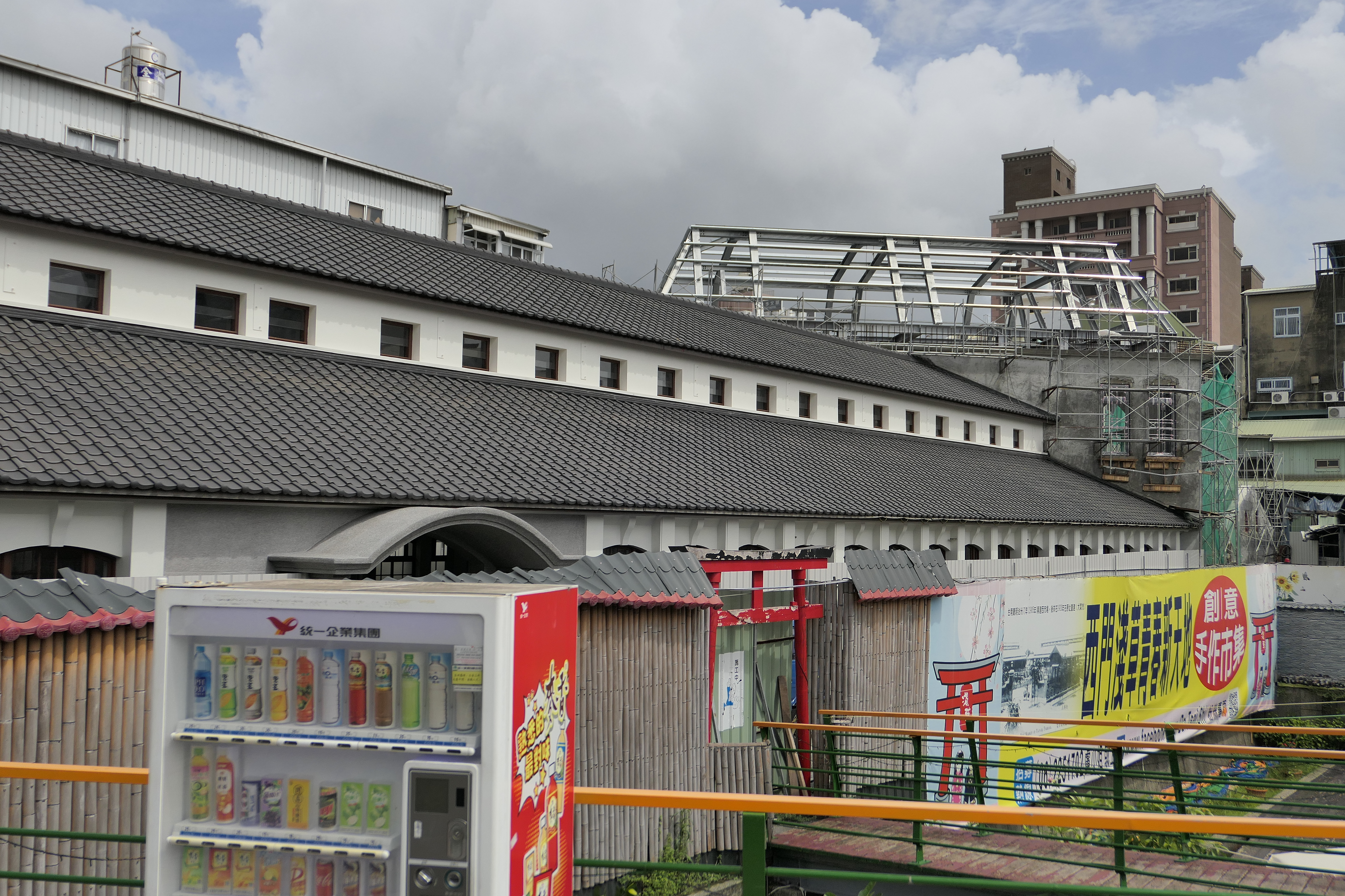 中文（台灣）: 整修中的臺南西市場